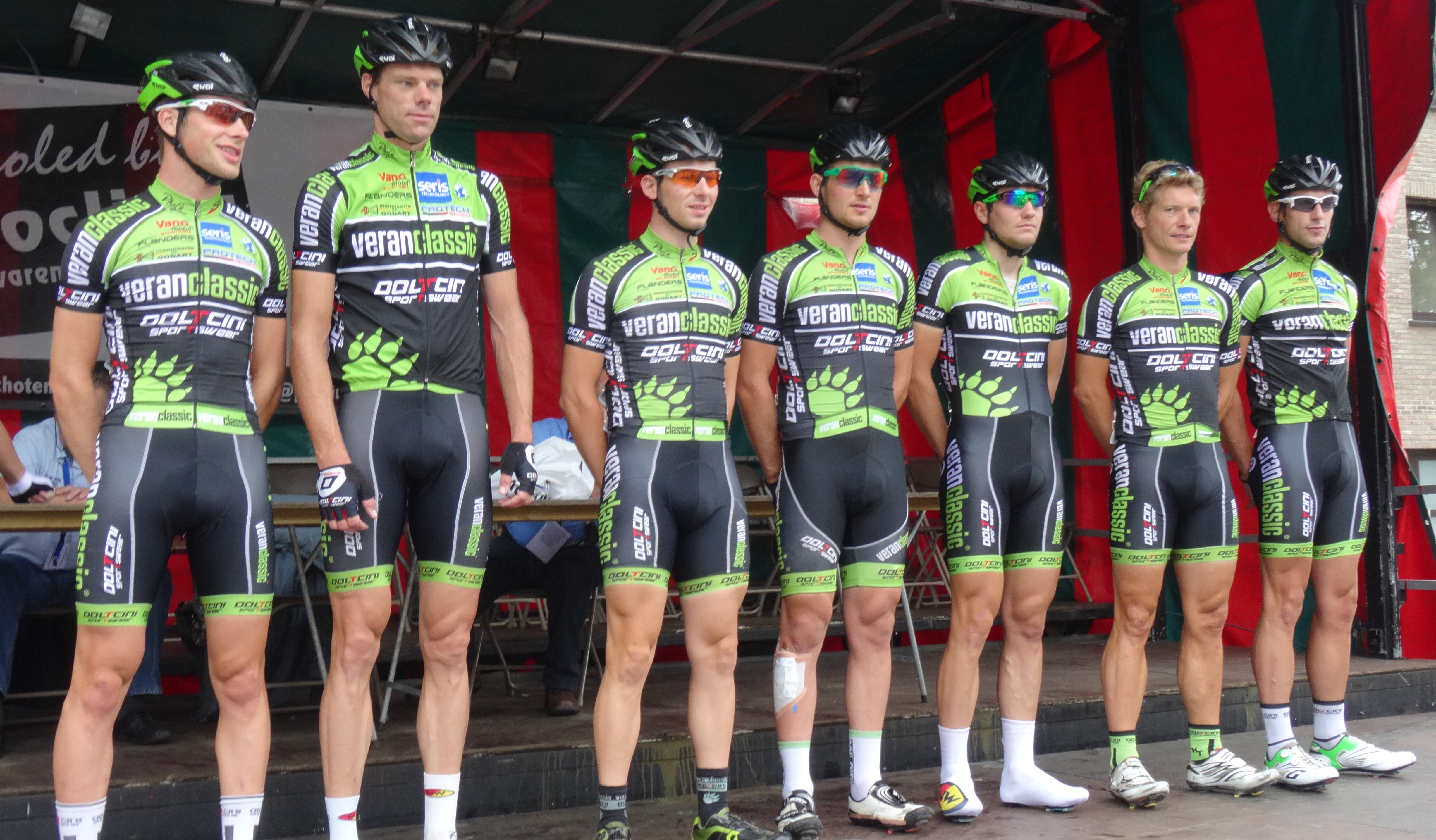 Reportage photographique réalisé le dimanche 10 août à l'occasion du départ et de l'arrivée de la Flèche du port d'Anvers 2014 à Merksem (Anvers), Belgique.